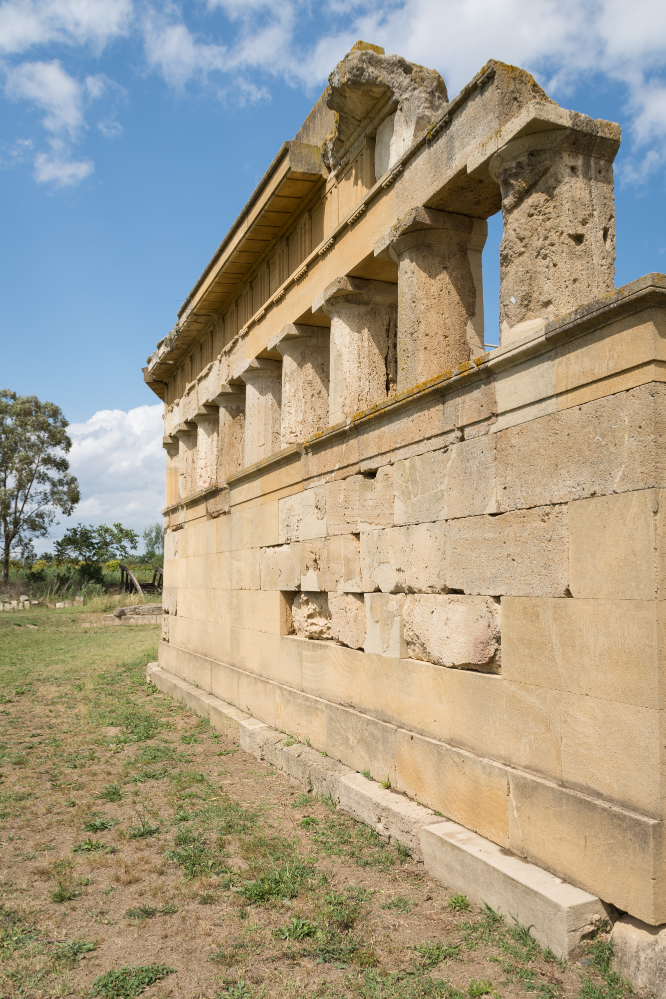 Museo Archeologico Nazionale di Metaponto This is a photo of a monument which is part of cultural heritage of Italy.